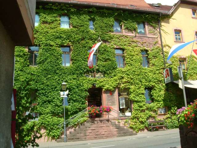 Die Apotheke in Stadtprozelten wurde nach 1811 am Platz der abgetragenen Georgenkapelle errichtet.